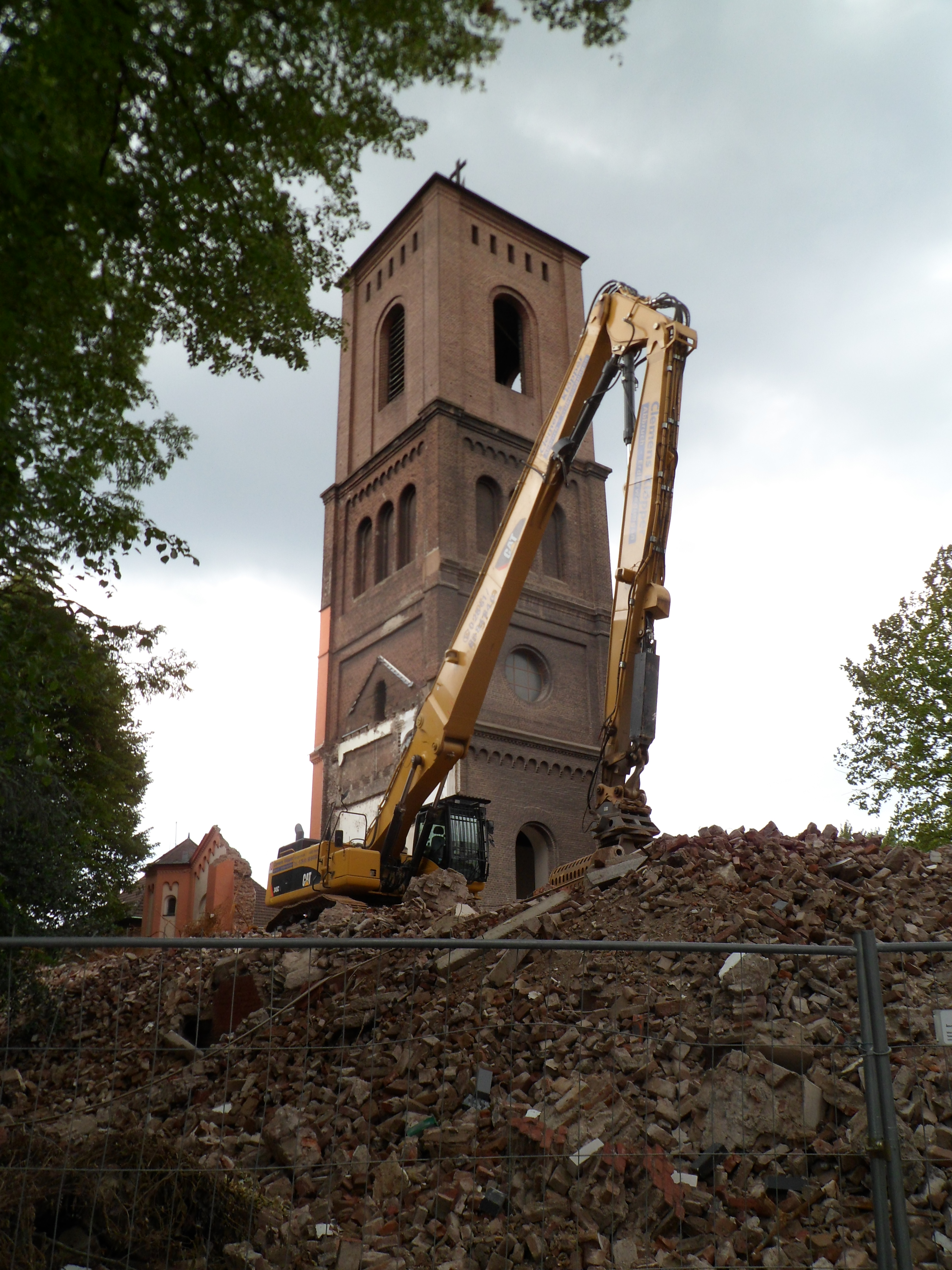 Kirchturm des Redemptoristenklosters Bochum vor seinem Abriss